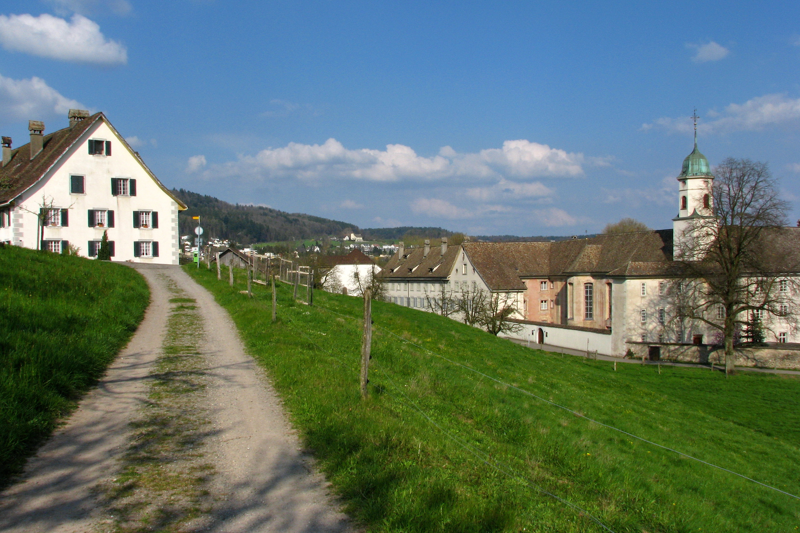 Kloster Fahr in Würenlos, Unterengstringen to the left, Limmattal in the background.